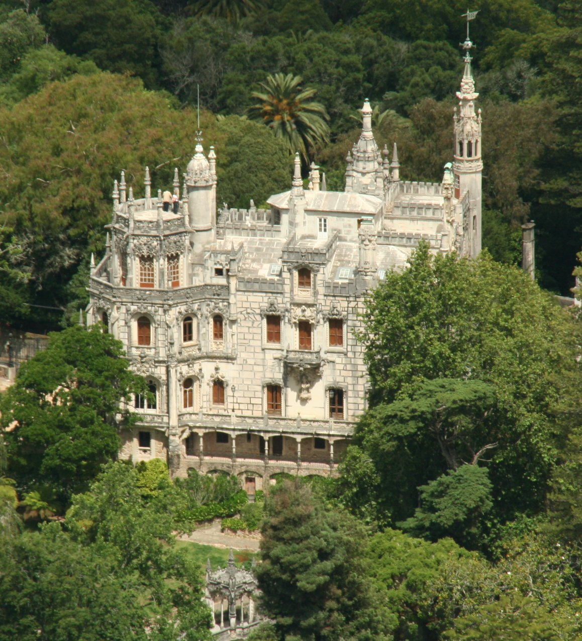 Quinta da Regaleira, Sintra, Portugal